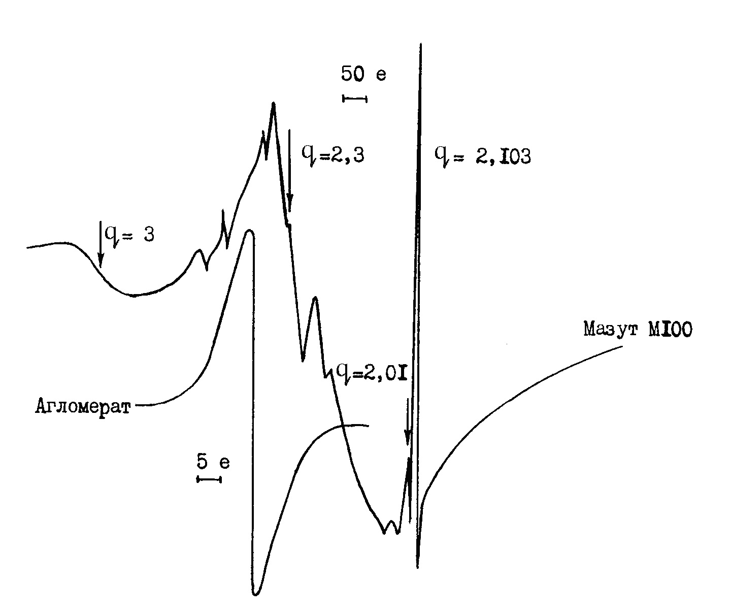 Фото